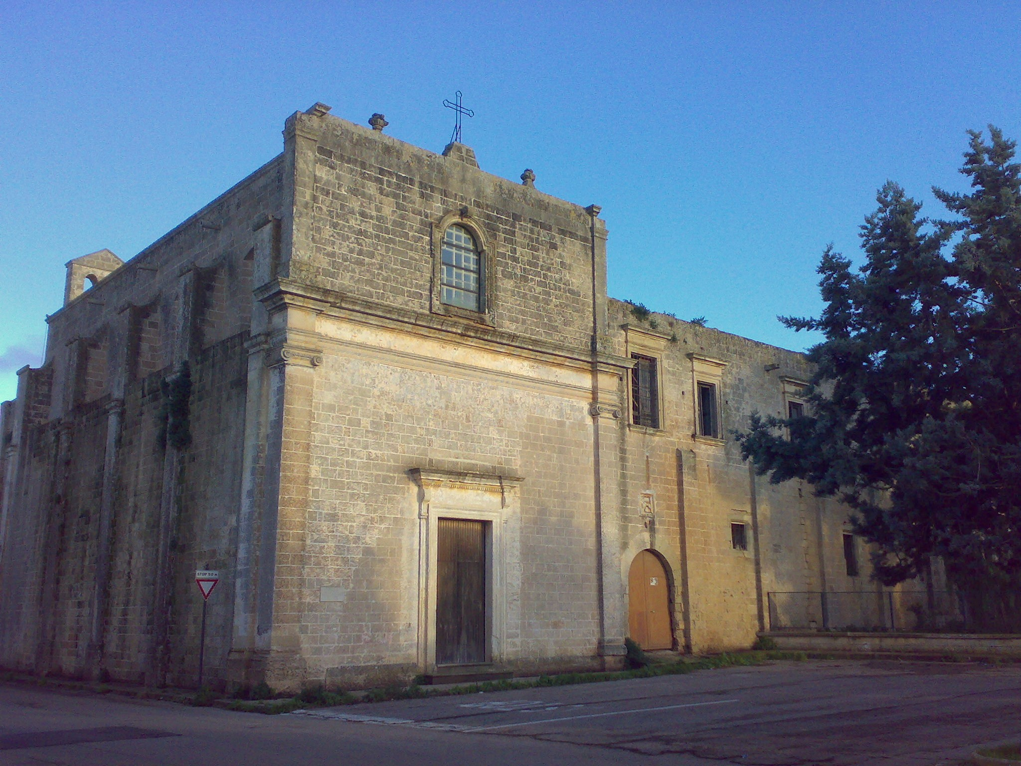 Chiesa del convento Martignano